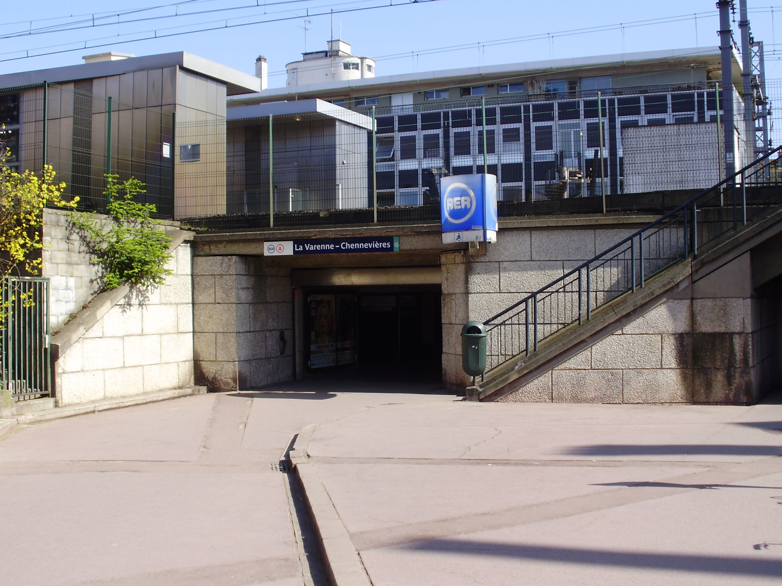 Gare de La Varenne - Chennevières, à Saint-Maur-des-Fossés, Val-de-Marne, France : entrée de la gare sur l'avenue du Bac, côté nord-ouest des voies